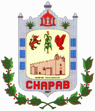 Escudo del Municipio de Chapab.